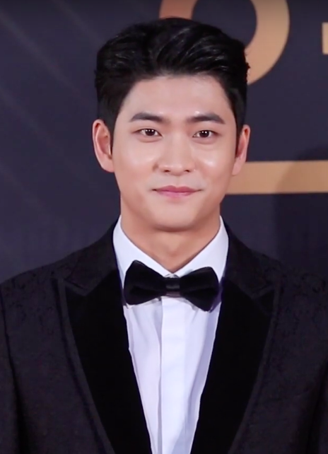 191231 KBS연기대상 강태오.